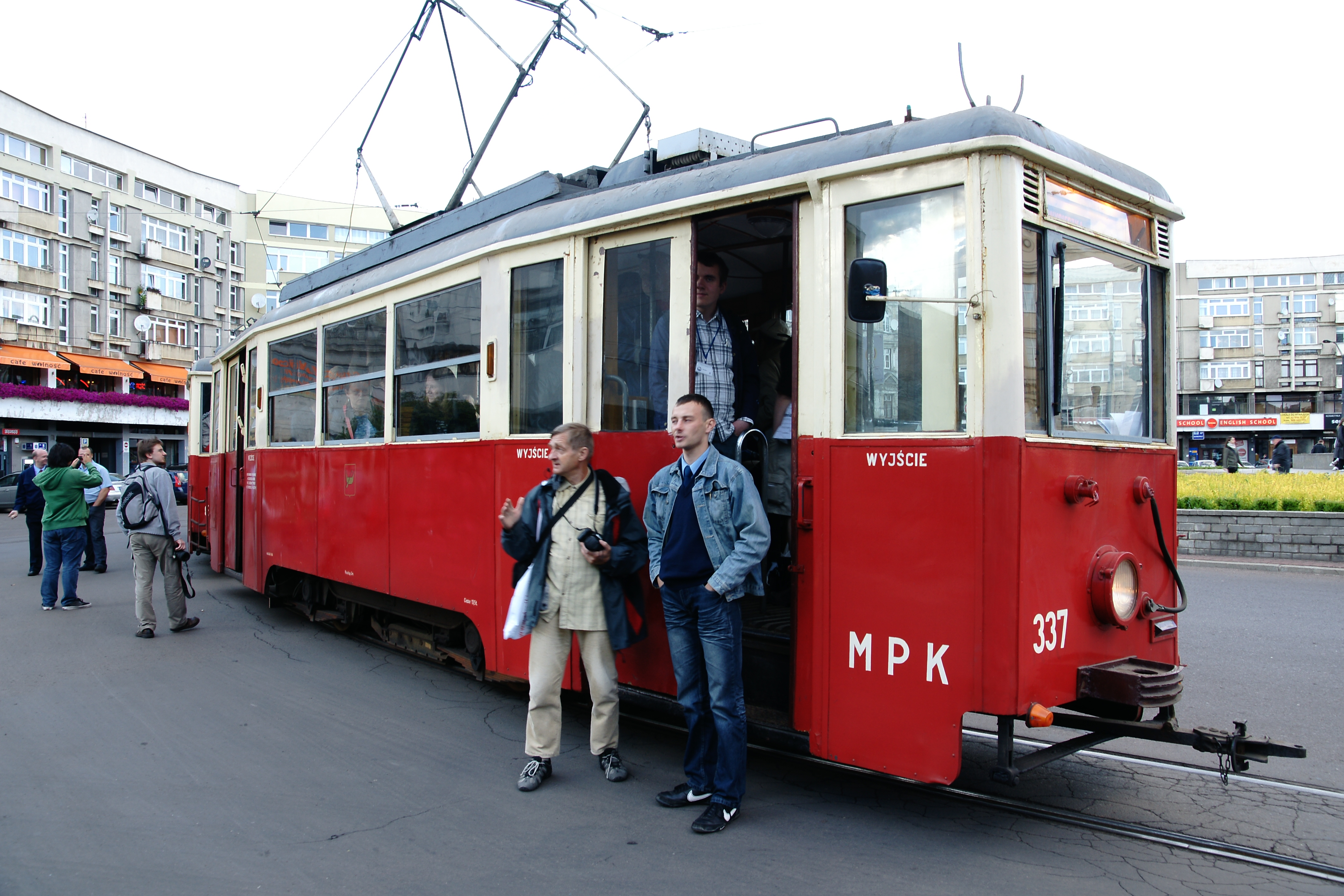 stary egzemplarz tramwaju oraz motorniczy Paweł Kaźmierczak z zakładu eksploatacji tramwajów nr 2 Chocianowice